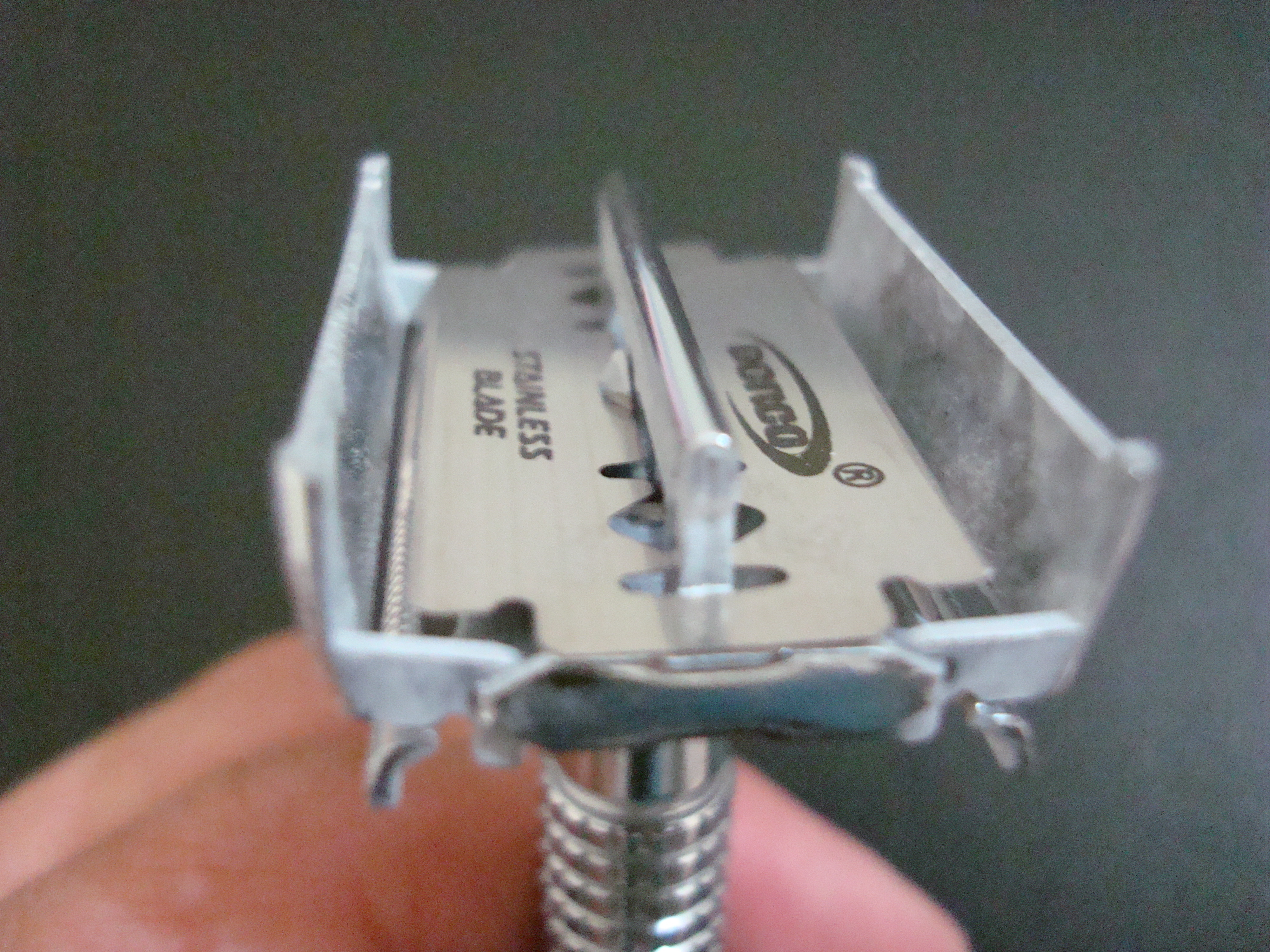 Weishi abierto 2